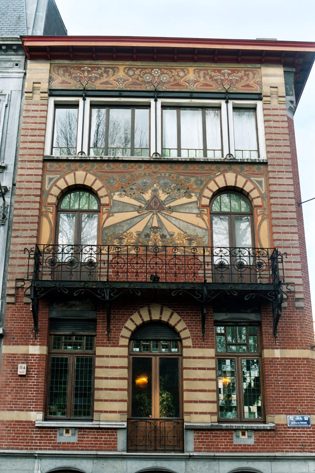 Belgique - Charleroi - Maison Dorée - Art Nouveau - architecte Alfred Frère - sgraffites de Gabriel van Dievoet (1899)